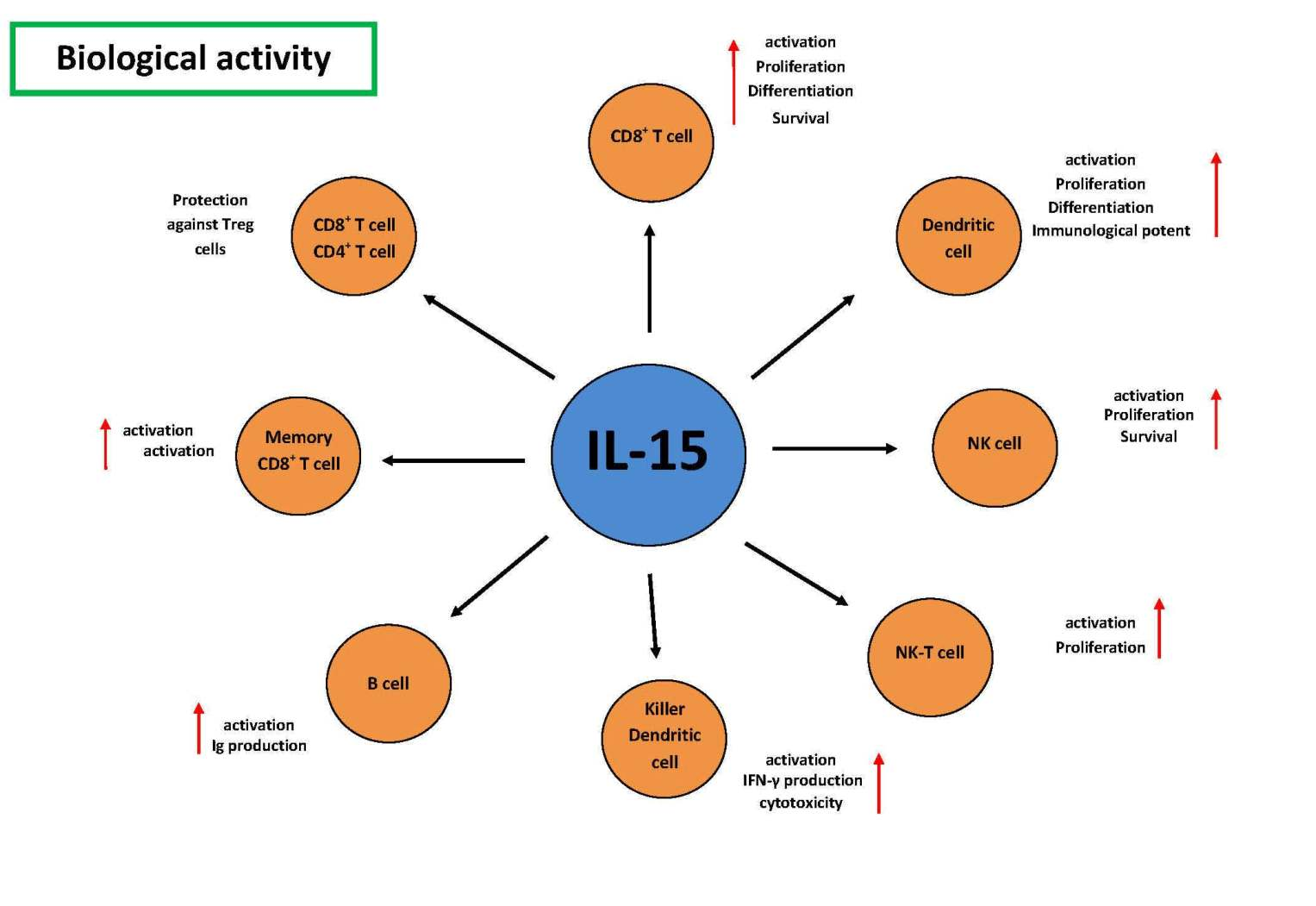 Biologgická aktivita IL-15